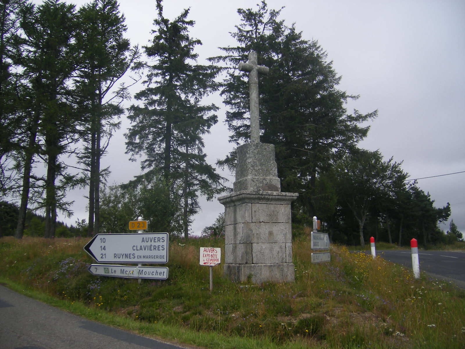 La Croix de Fau (1270 m), commune Paulhac de Margeride